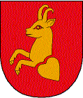 Wappen der Gemeinde Pettneu am Arlberg in Österreich